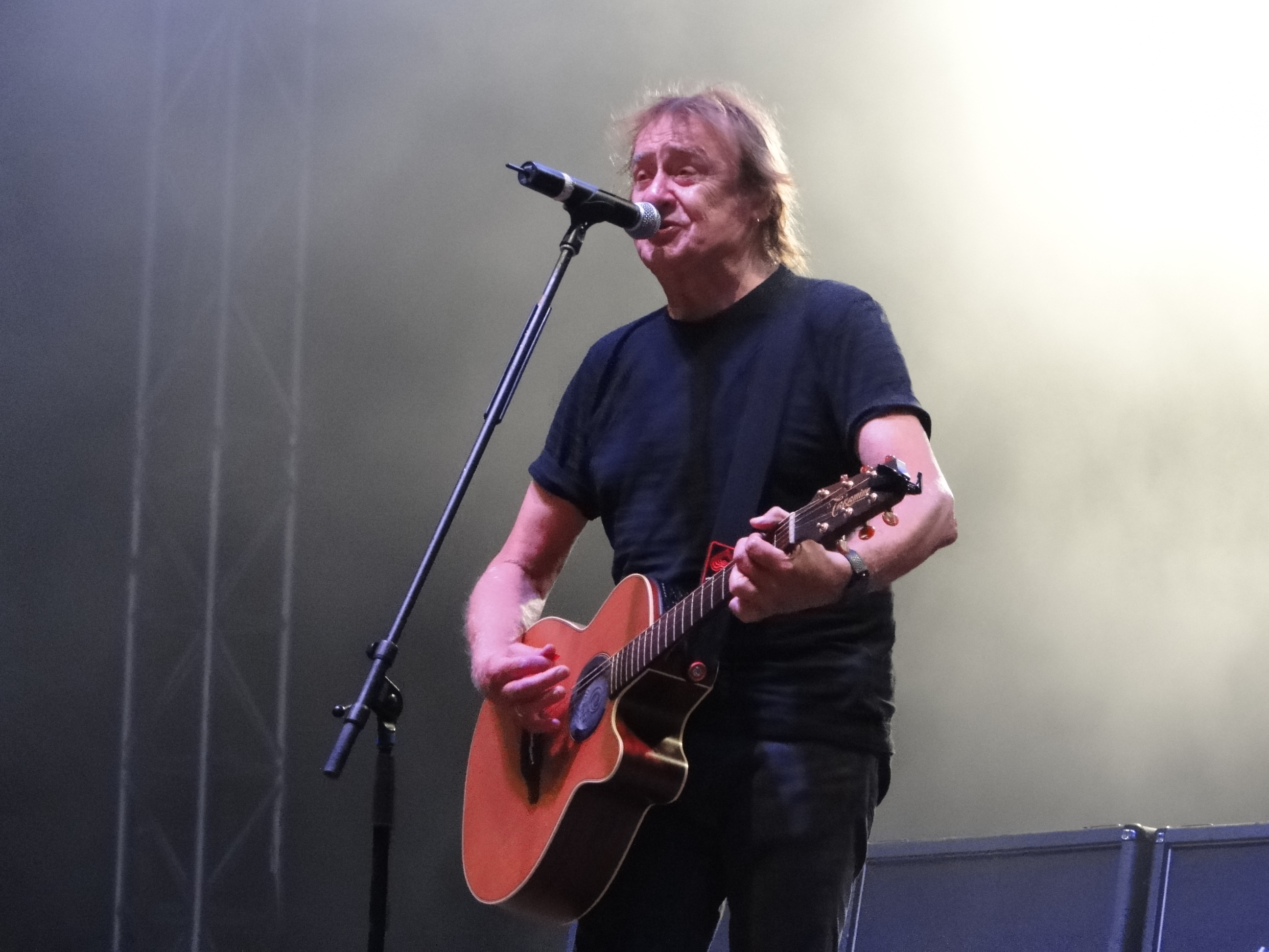 Dieter "Maschine" Birr von den Puhdys während eines Auftritts in Dresden 2013